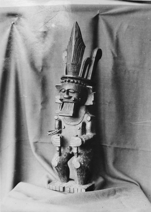 Negatief. Voorouderfiguur, adu zatua (zie verder het boek van het Museum Nusantara Delft, 1990).. Houten mannelijk voorouderbeeld, Nias